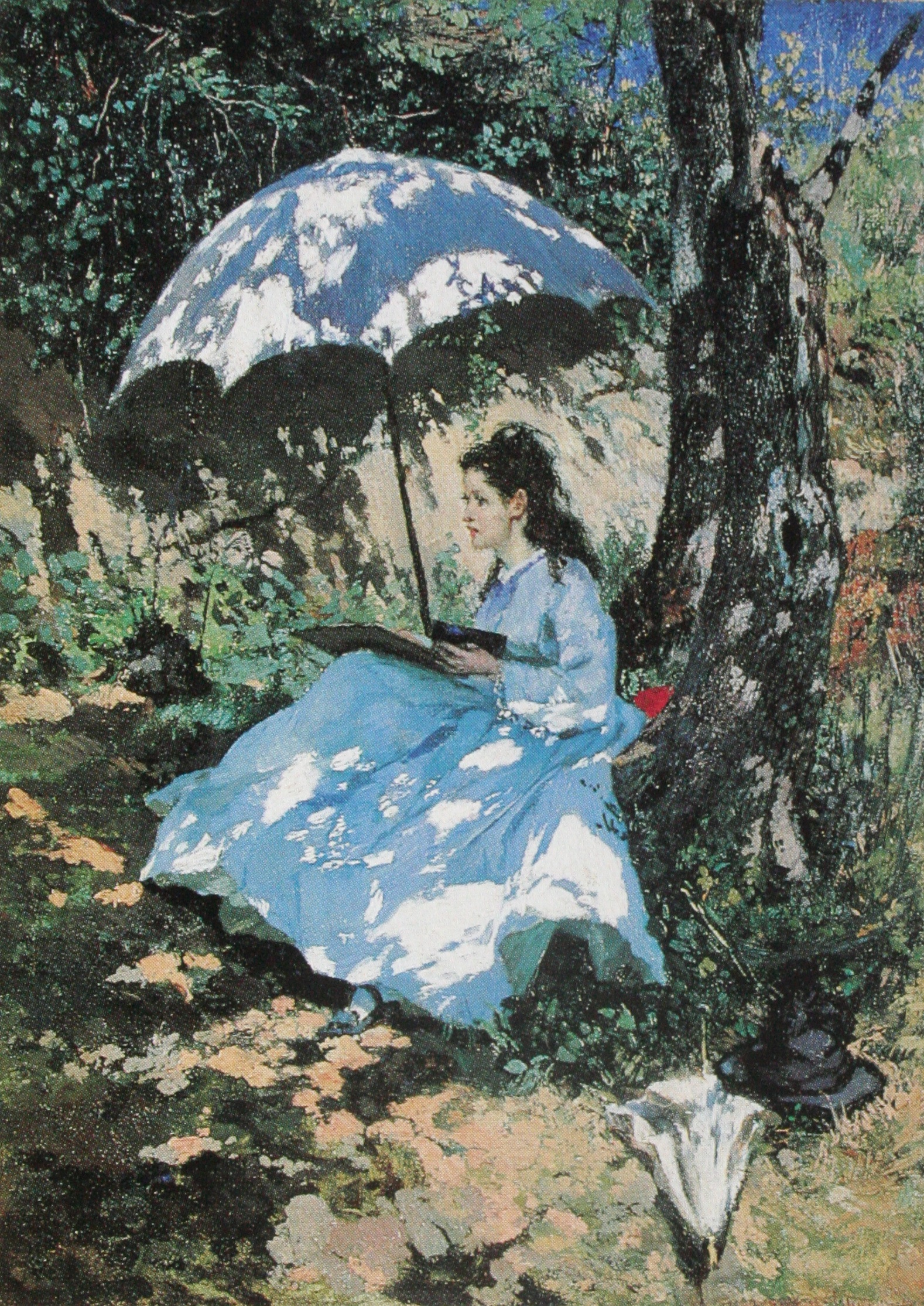 Malerin_im_Sonnenschein , Gemälde von Frank Buchser, 1862, 34 x 25 cm, Kunstmuseum Solothurn, Depositum des Kunstvereins Solothurn